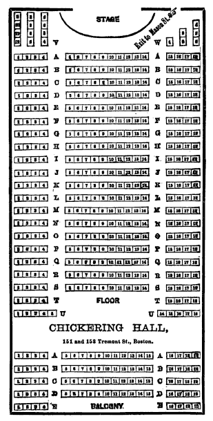 Boston, Massachusetts